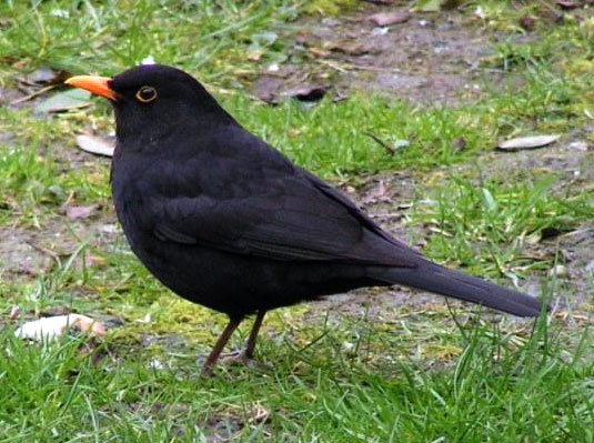 Märel Männchen